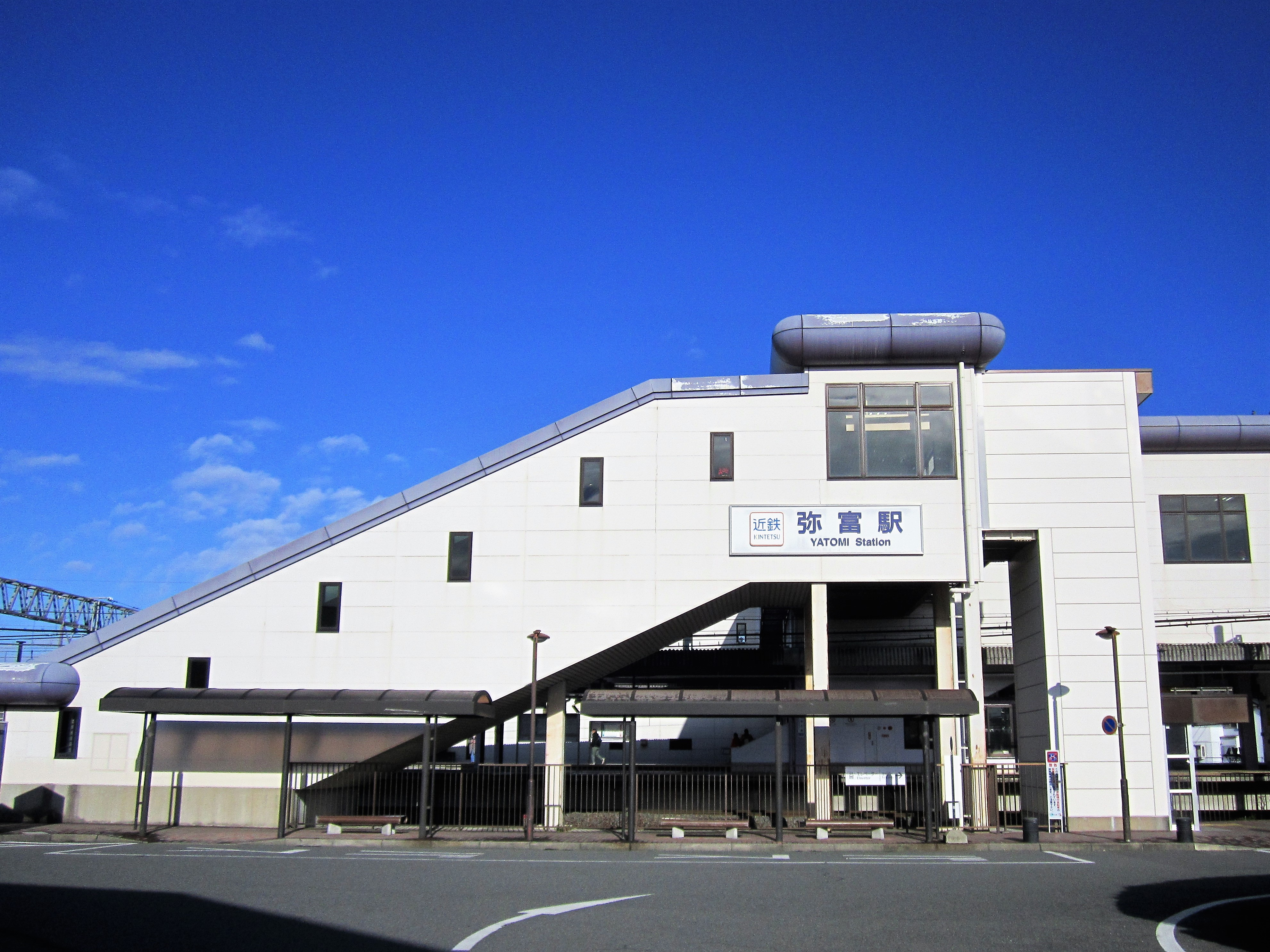 近鉄弥富駅南口 Canon PowerShot A2200